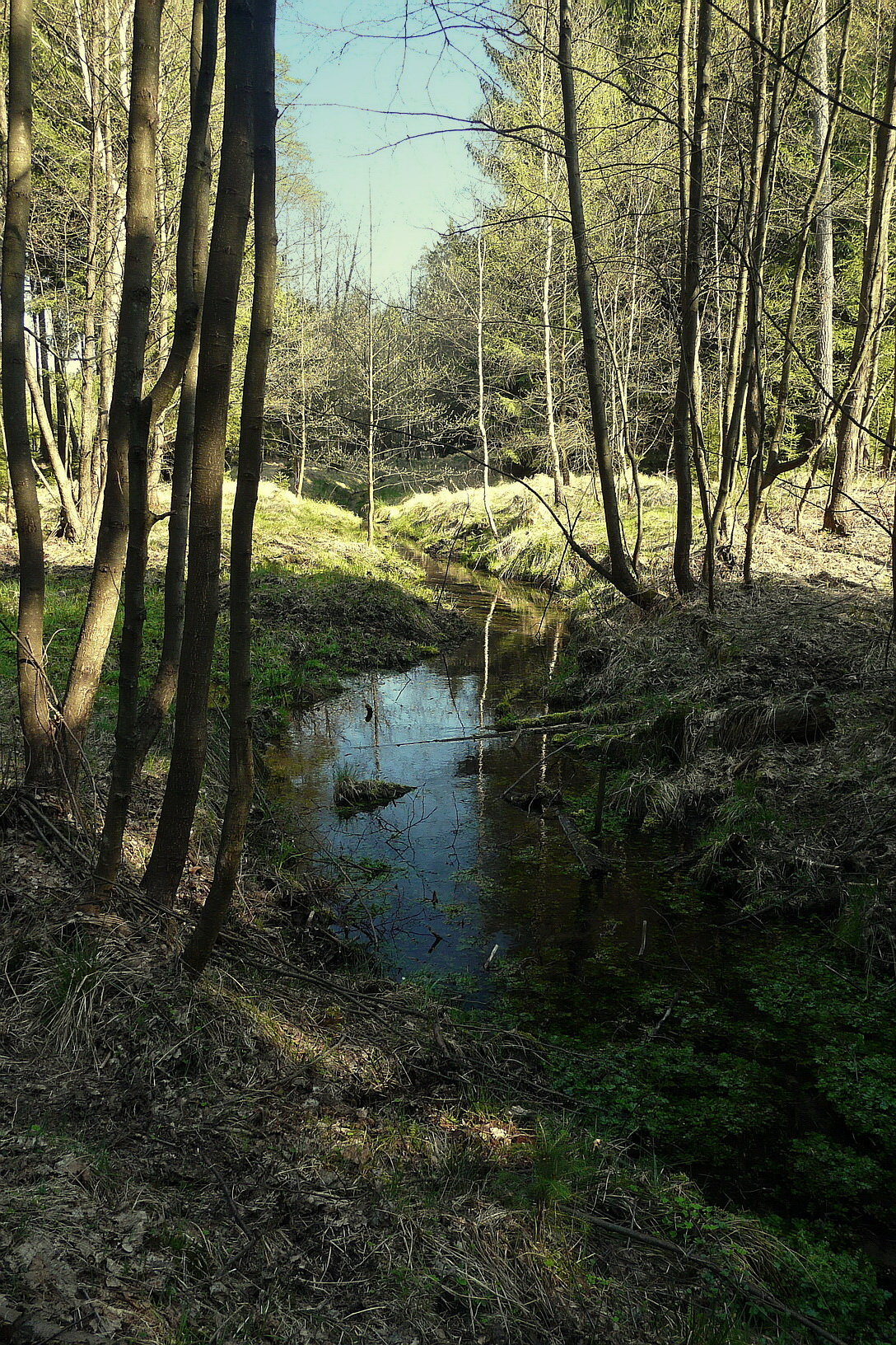 Hradčanský potok